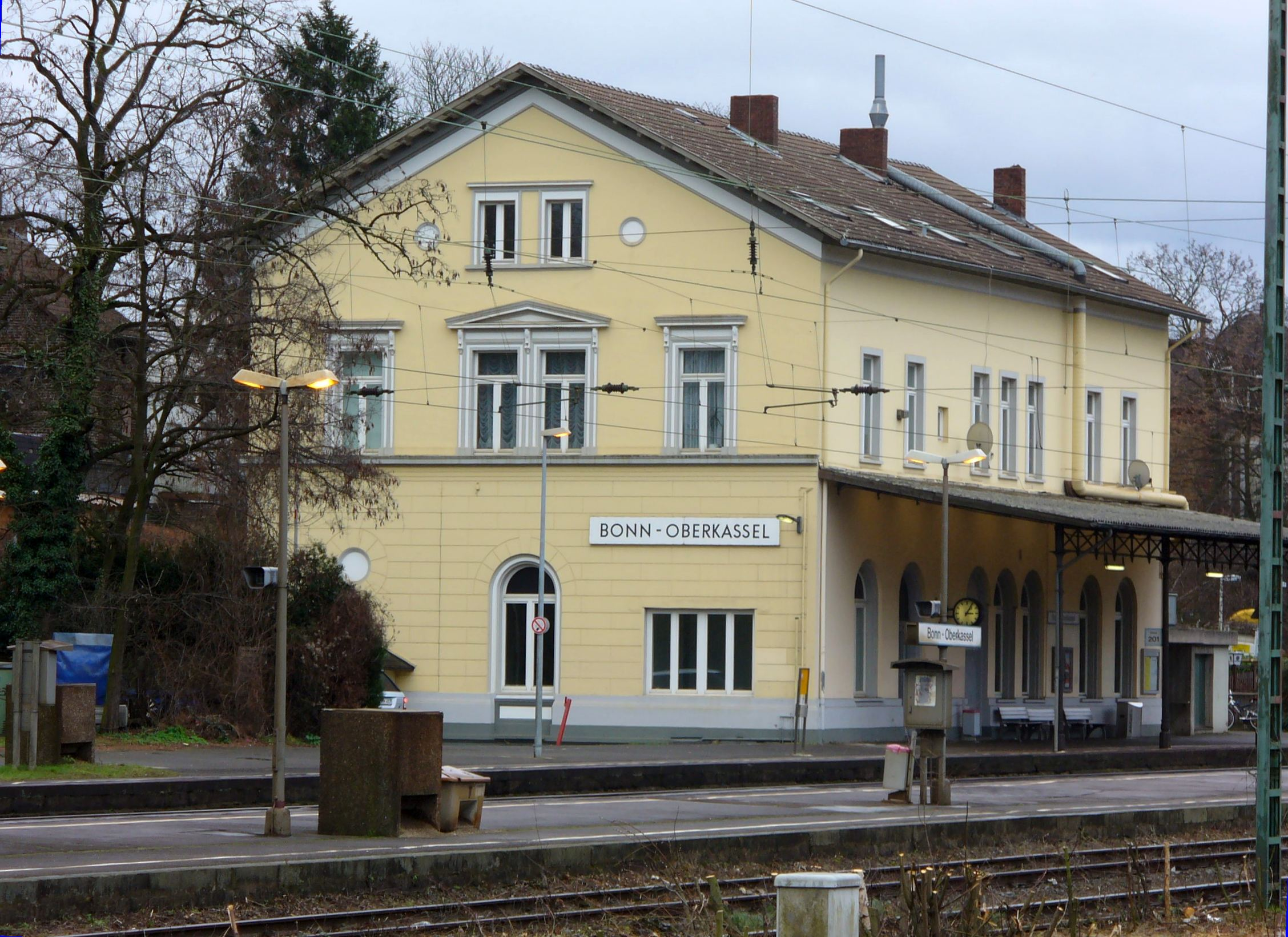 Denkmalgeschütztes Empfangsgebäude des Bahnhofs in Bonn-Oberkassel.